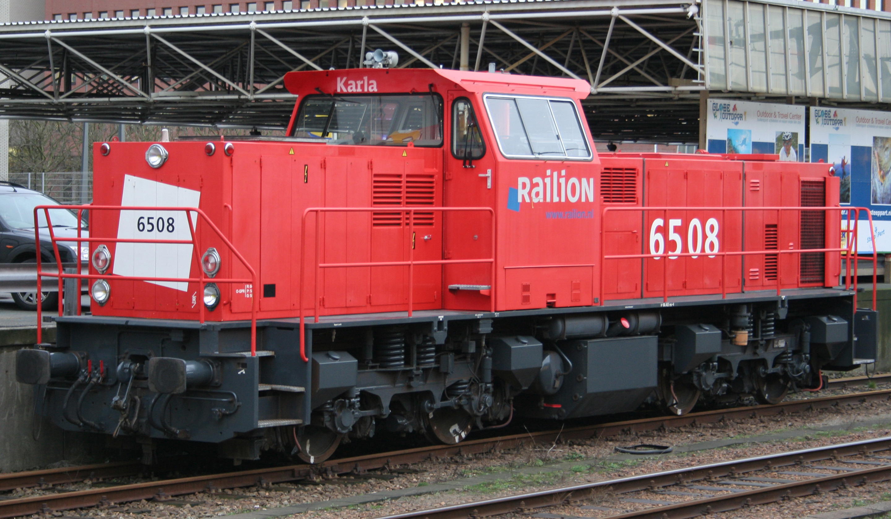 Railion 6508 Den Haag